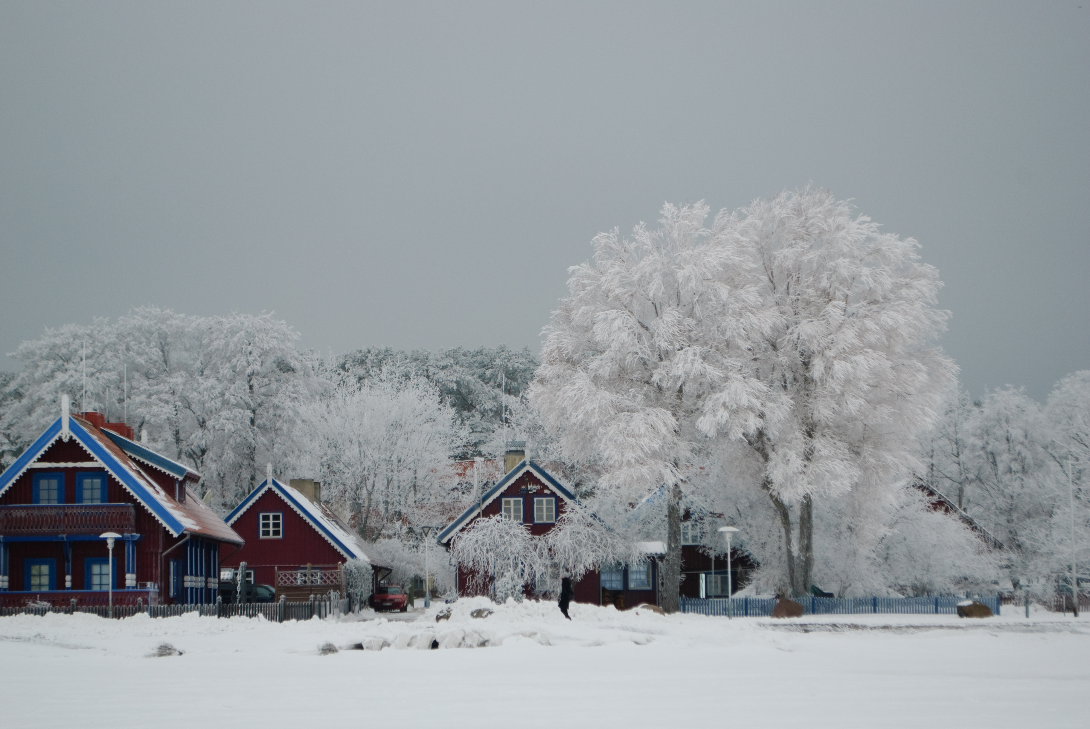 nida